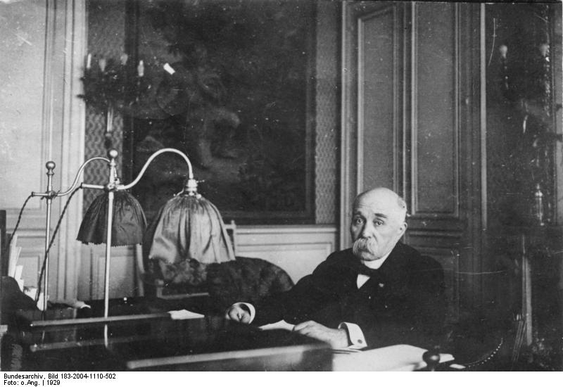 Georges Clemenceau Georges Benjamin Clemenceau 1929 [Georges Benjamin Clemenceau am Schreibtisch sitzend] Abgebildete Personen: Clemenceau, Georges Benjamin Dr.: Ministerpräsident, Vorsitzender der Versailler Friedenskonferenz, Frankreich (GND 118676407)